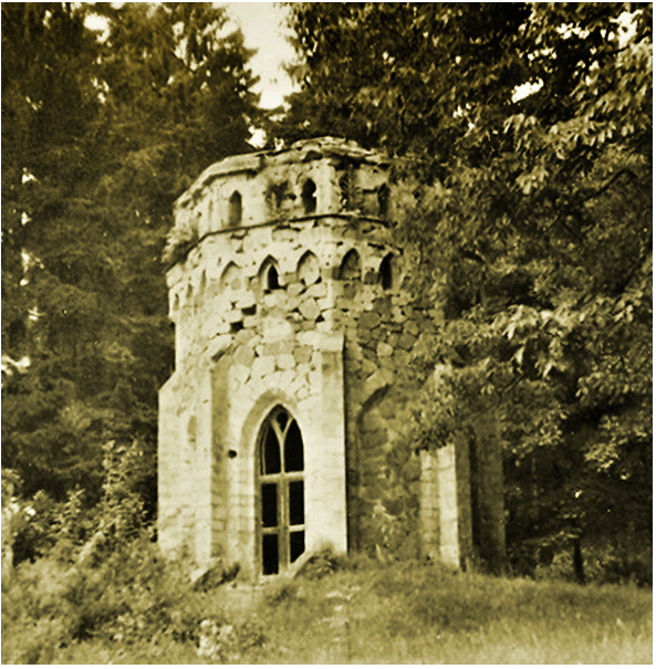 stará foto